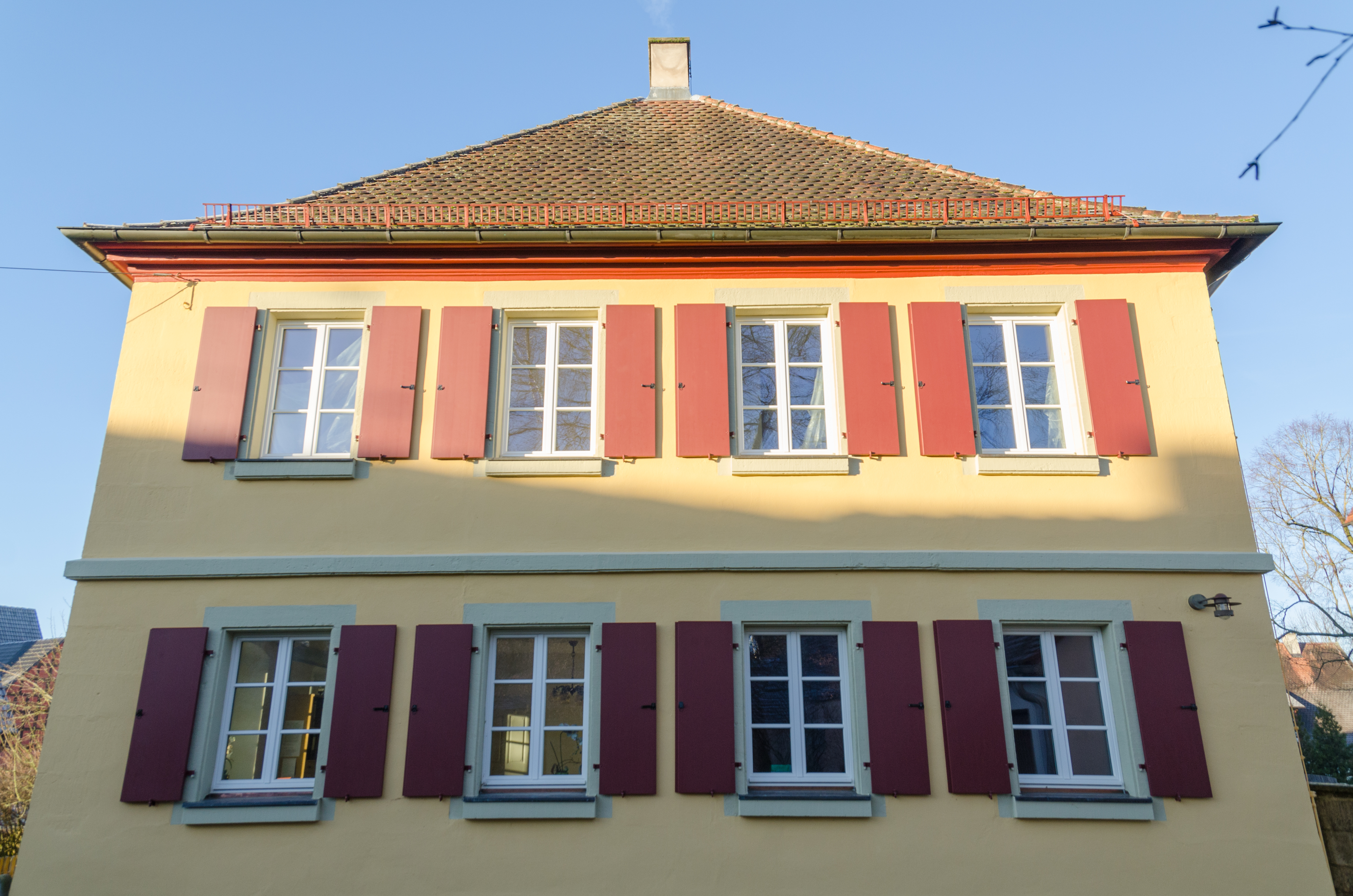 Wettringen, Schulstraße 7